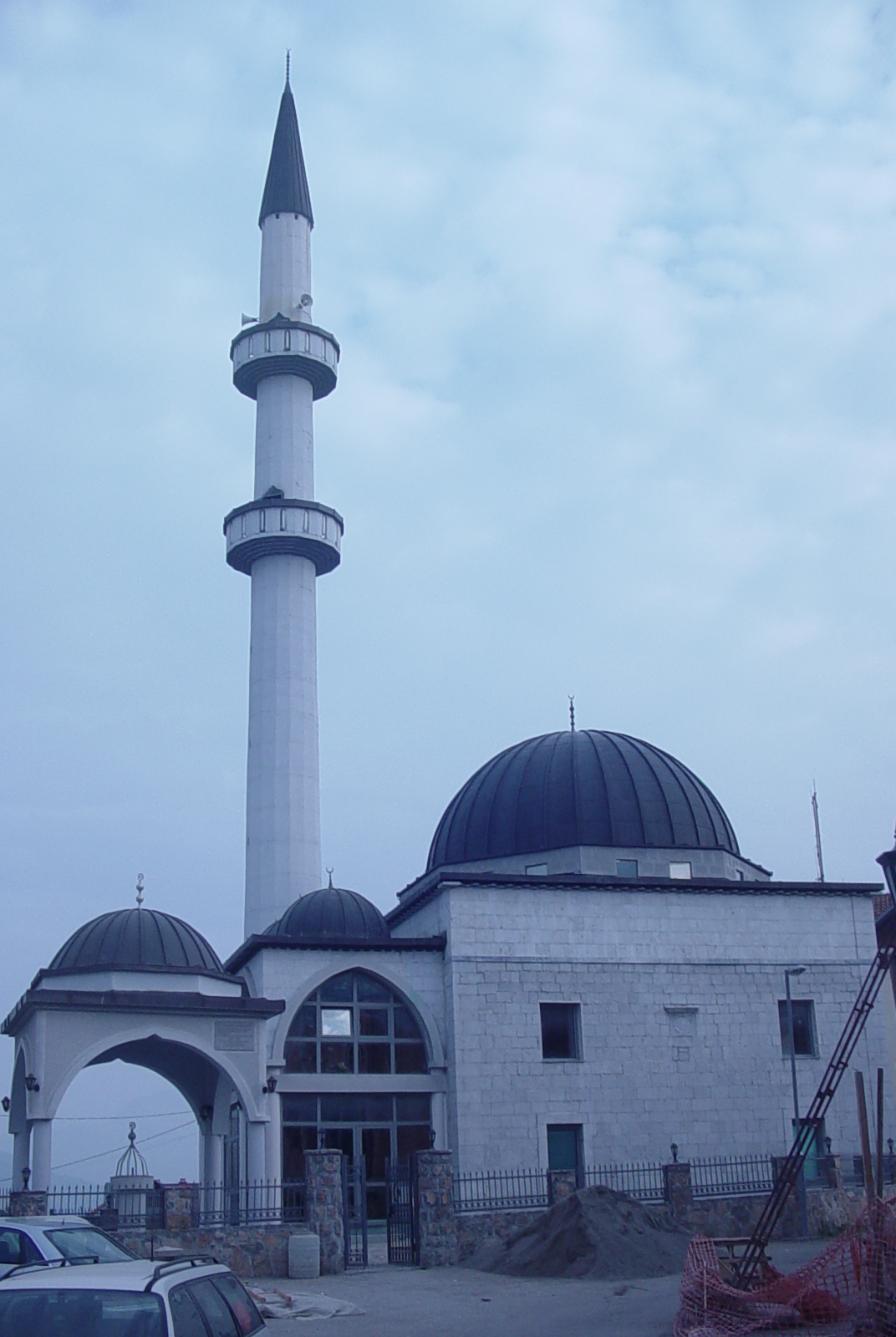 Џамија Султанија у Плаву. Фотографију направио Ogixxl 2008. године.